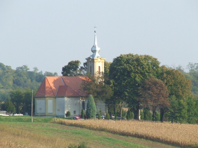 Nagyhajmás, Nepomuki Szent János római katolikus templom